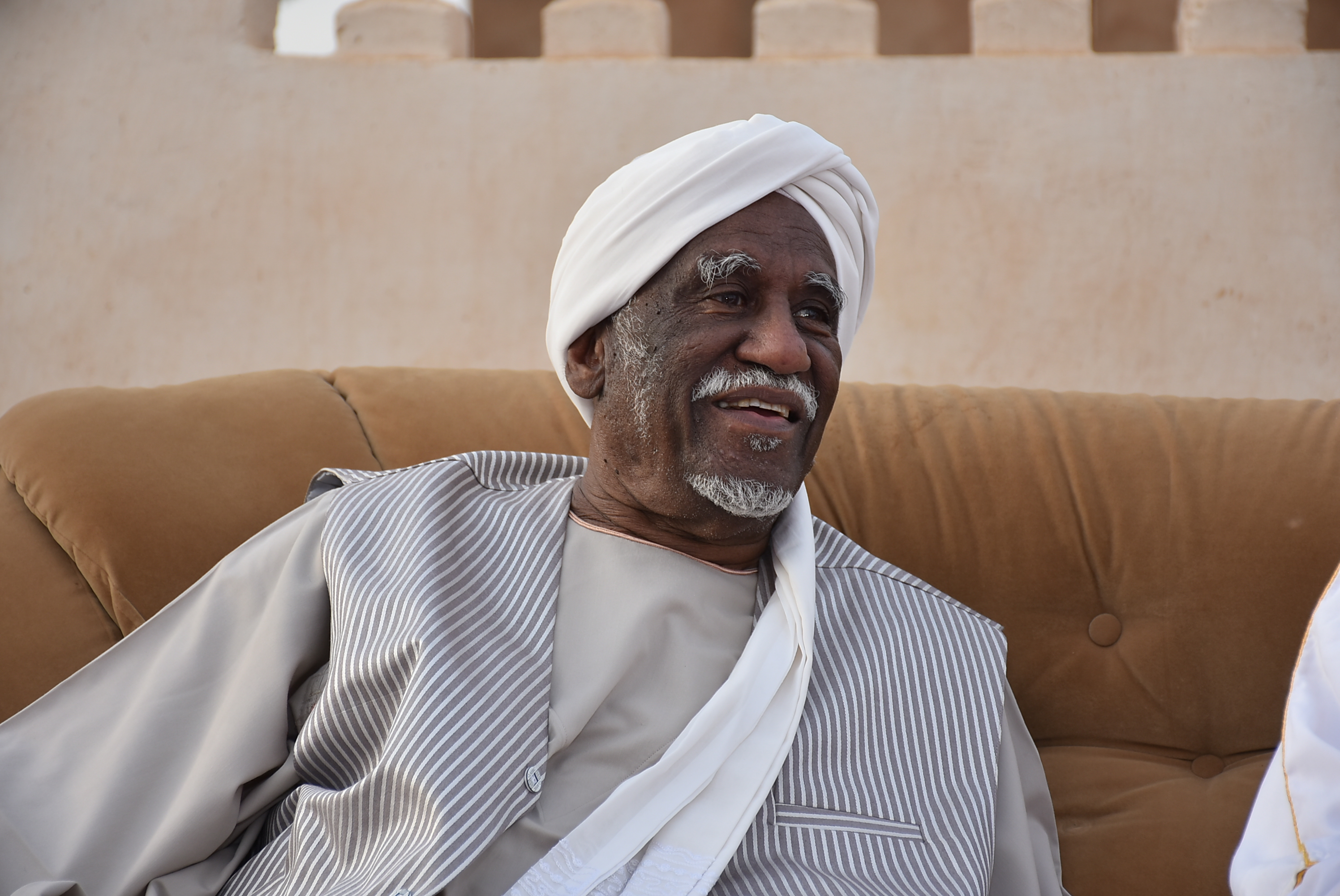 Emam: Ahmed abdelrahman Elmahdi